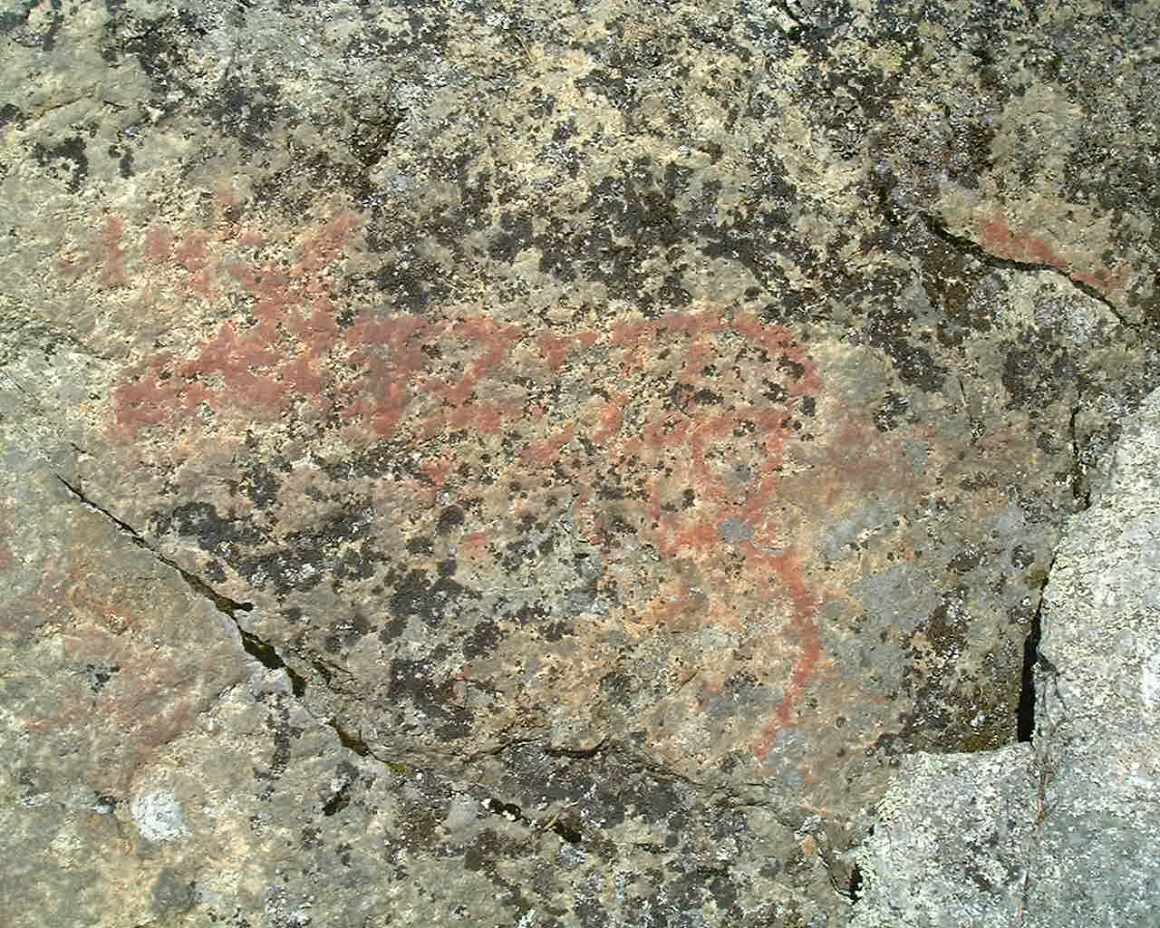 Hällmålning vid Fångsjön, Strömsund, Jämtland